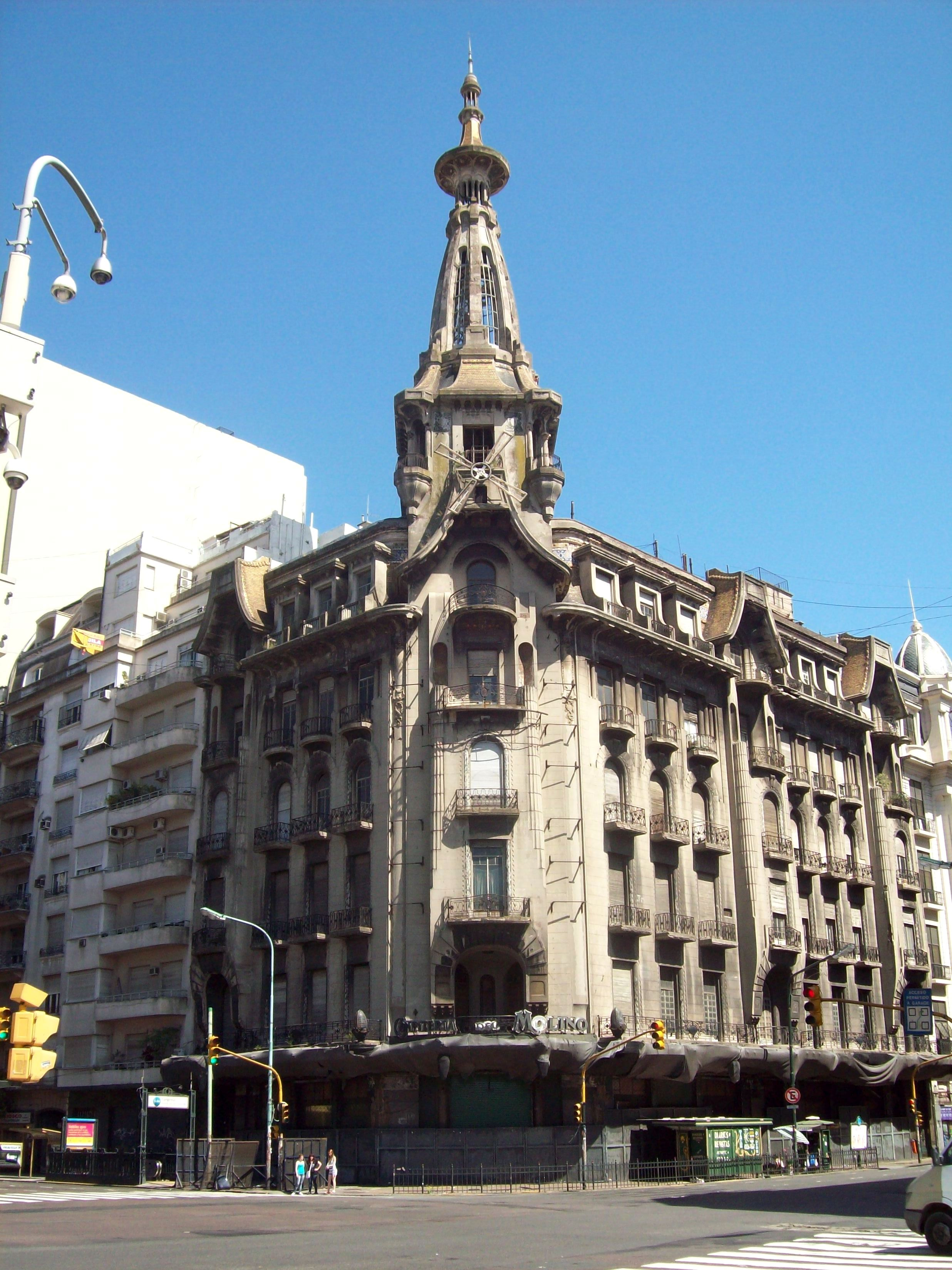 Antigua confitería "El Molino", en deplorable estado.